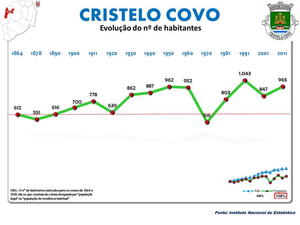 Censos 1864/2011